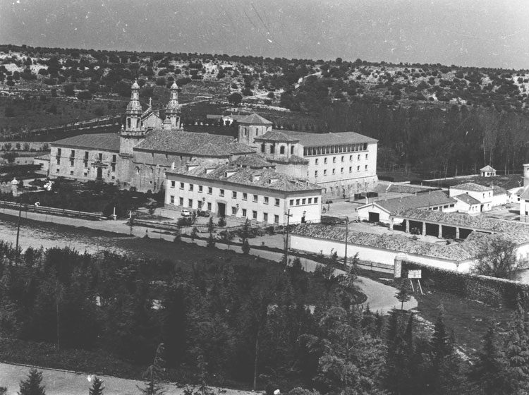 Monasterio. Vista panorámica - La Santa Espina (Valladolid) - Fotografía 240 x 180 B/N